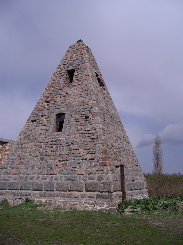 Піраміда Білевича